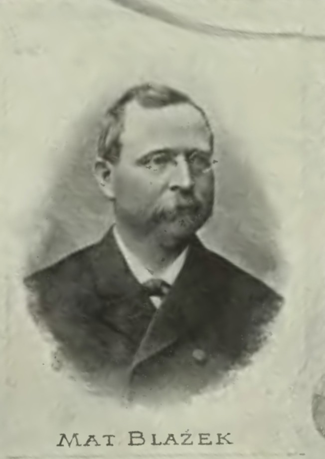 Matyáš Blažek (1844-1896) vyobrazení z publikace Národní album 1899